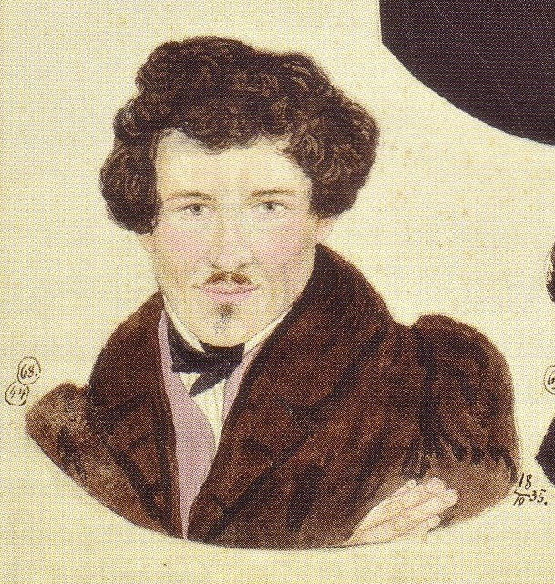 Franz Brandstäter (1815-1883) (Aquarellporträt von Wilhelm Schmiedeberg)